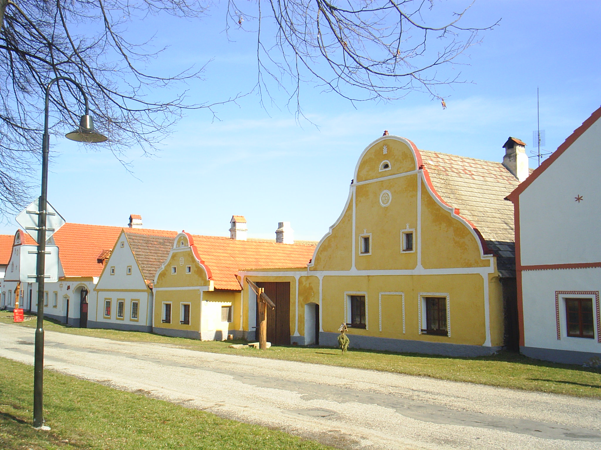 Holašovice-chráněná památka UNESCOEsperanto: Holašovice-protektata memorindaĵo de UNESCO